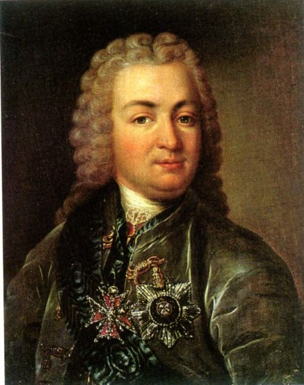 Рейнгольд Густав Лёвенвольде Deitsch: Reinhold Gustaw von Loewenwolde